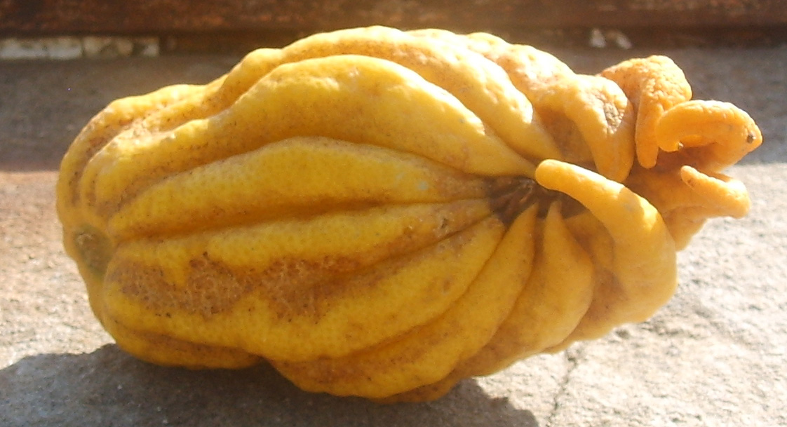 Parco di Villa Reale di Castello (Villa di Castello) Collection of citrus (collezione di agrumi rari)in Florence, italy in Florence, Italy